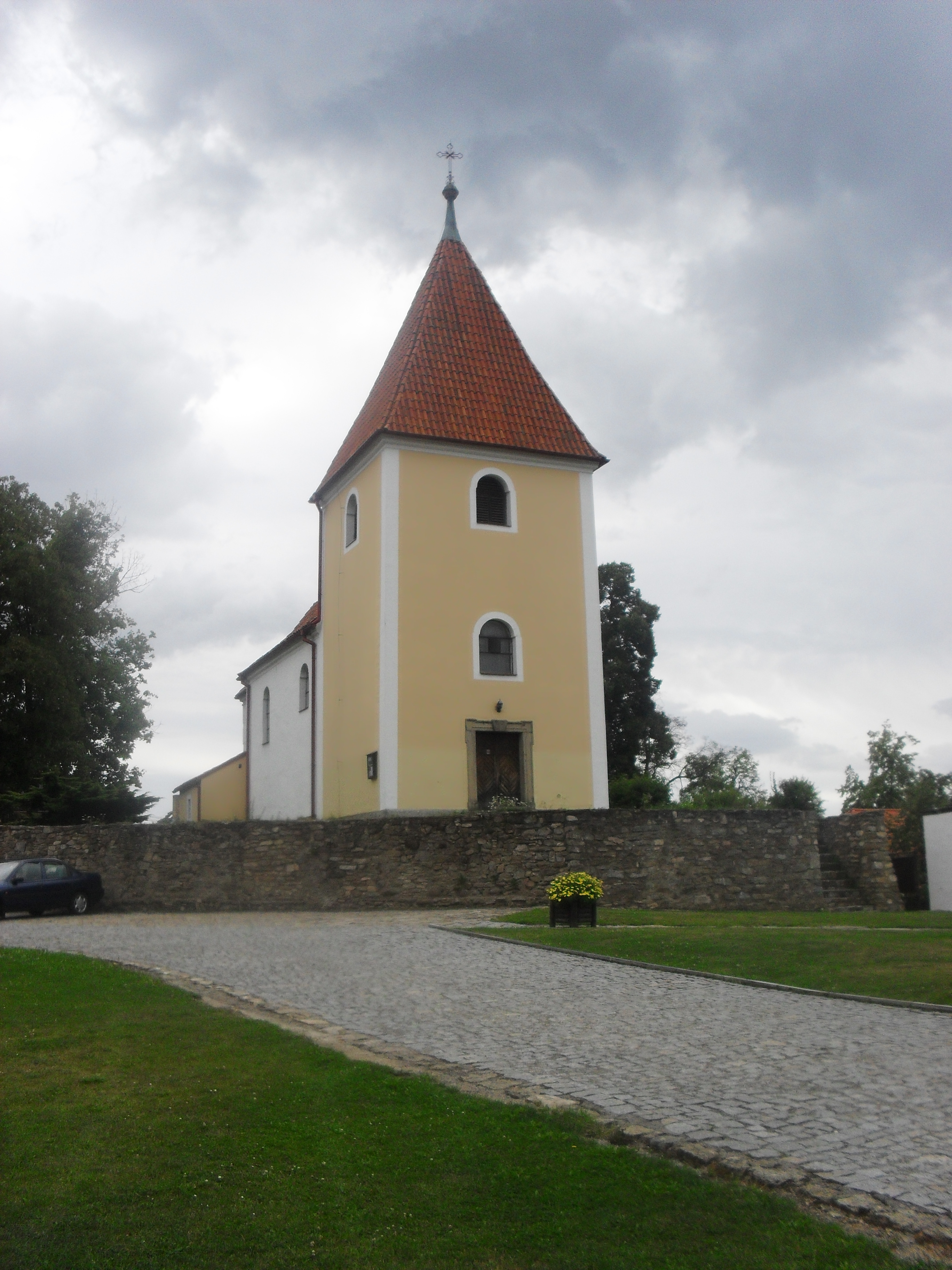 CHANOVICE - Kostel svatého Kříže